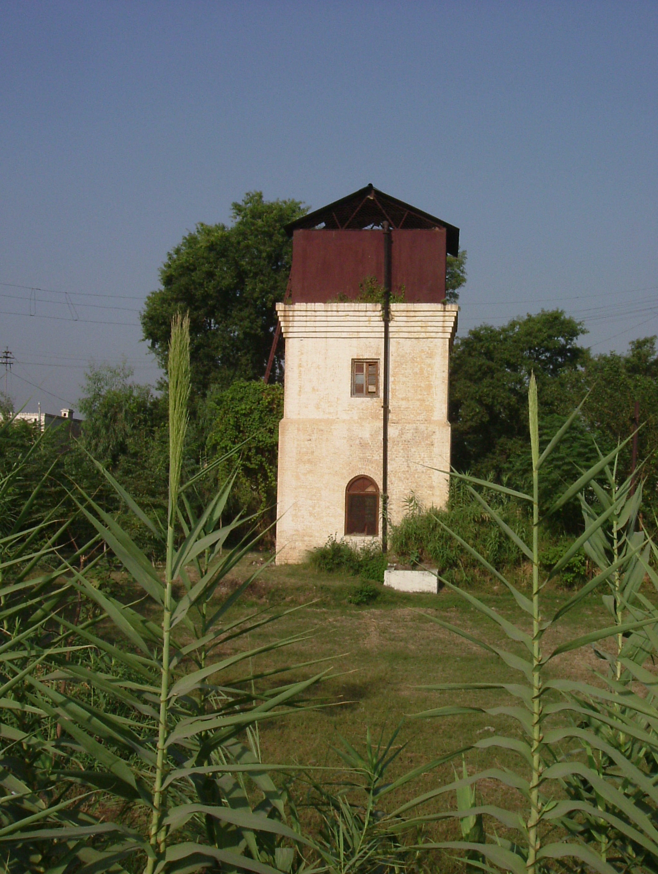 Old water tower